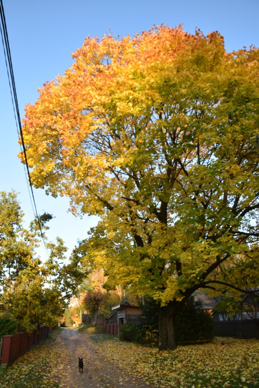 jesień w Poczopku